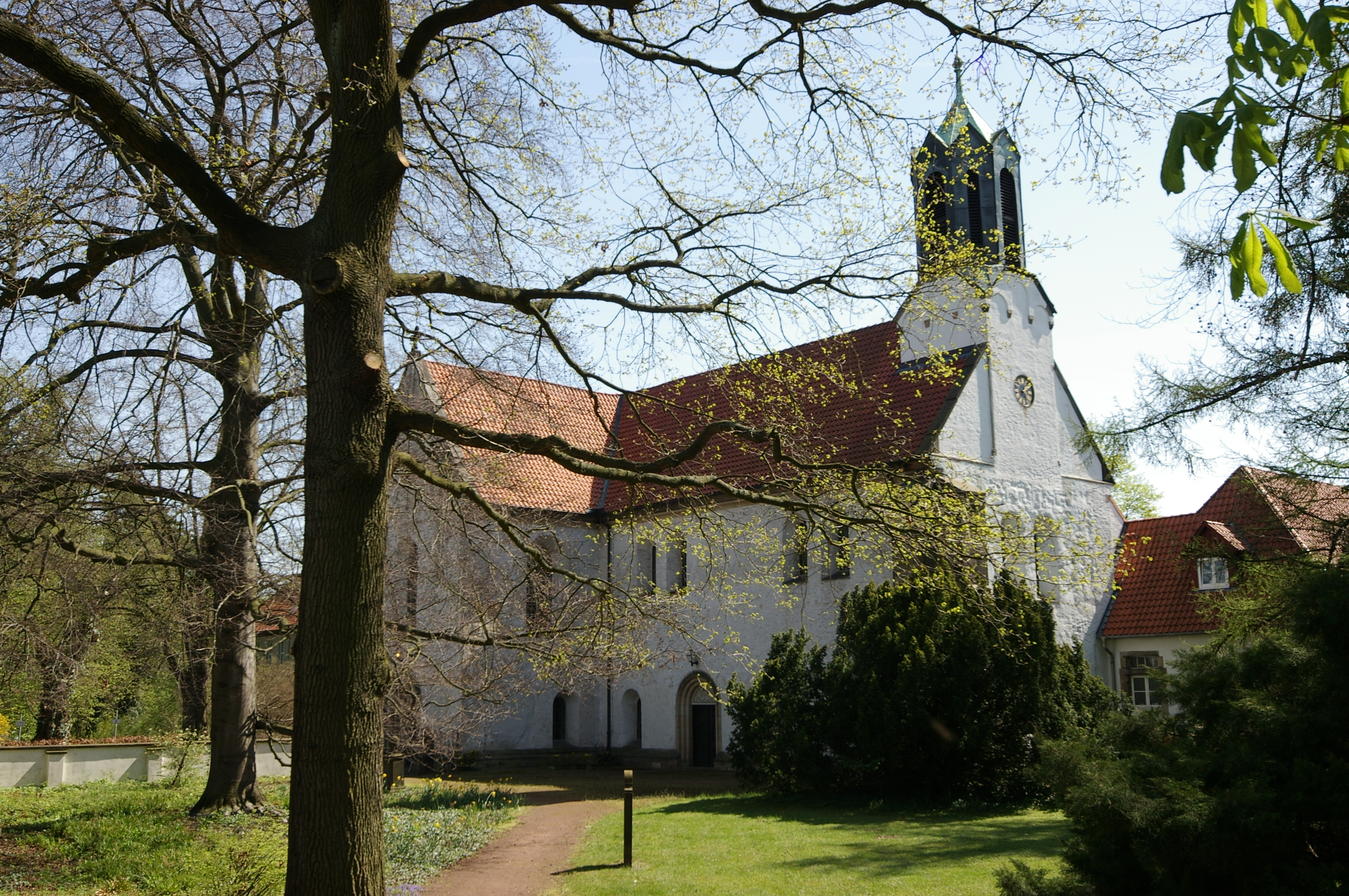 Hannover - OT Marienwerder - Kloster. 2005-04-20 Autor: Ingo Rickmann